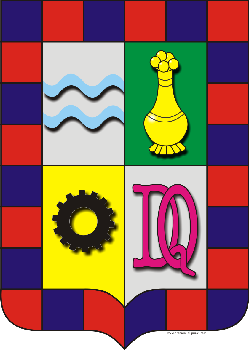 Escudo oficial del Municipio de Dosquebradas (Colombia), lo elaboré en el 2005 cuando realizaba un trabajo para la Alcaldía de Dosquebradas, retocado en el 2009. Dedico este trabajo a mi hija Camila.